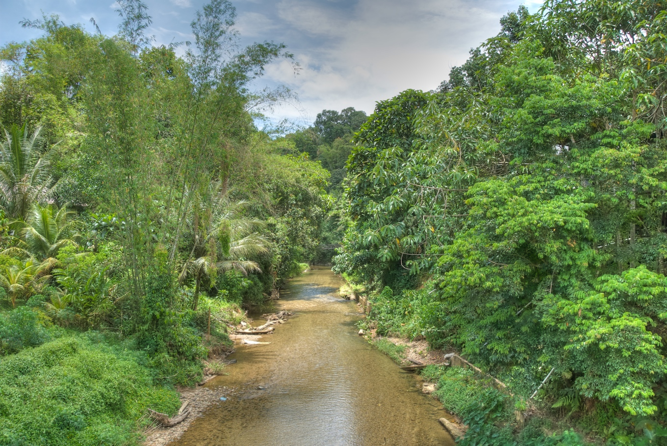 Sarawak, Malaysia